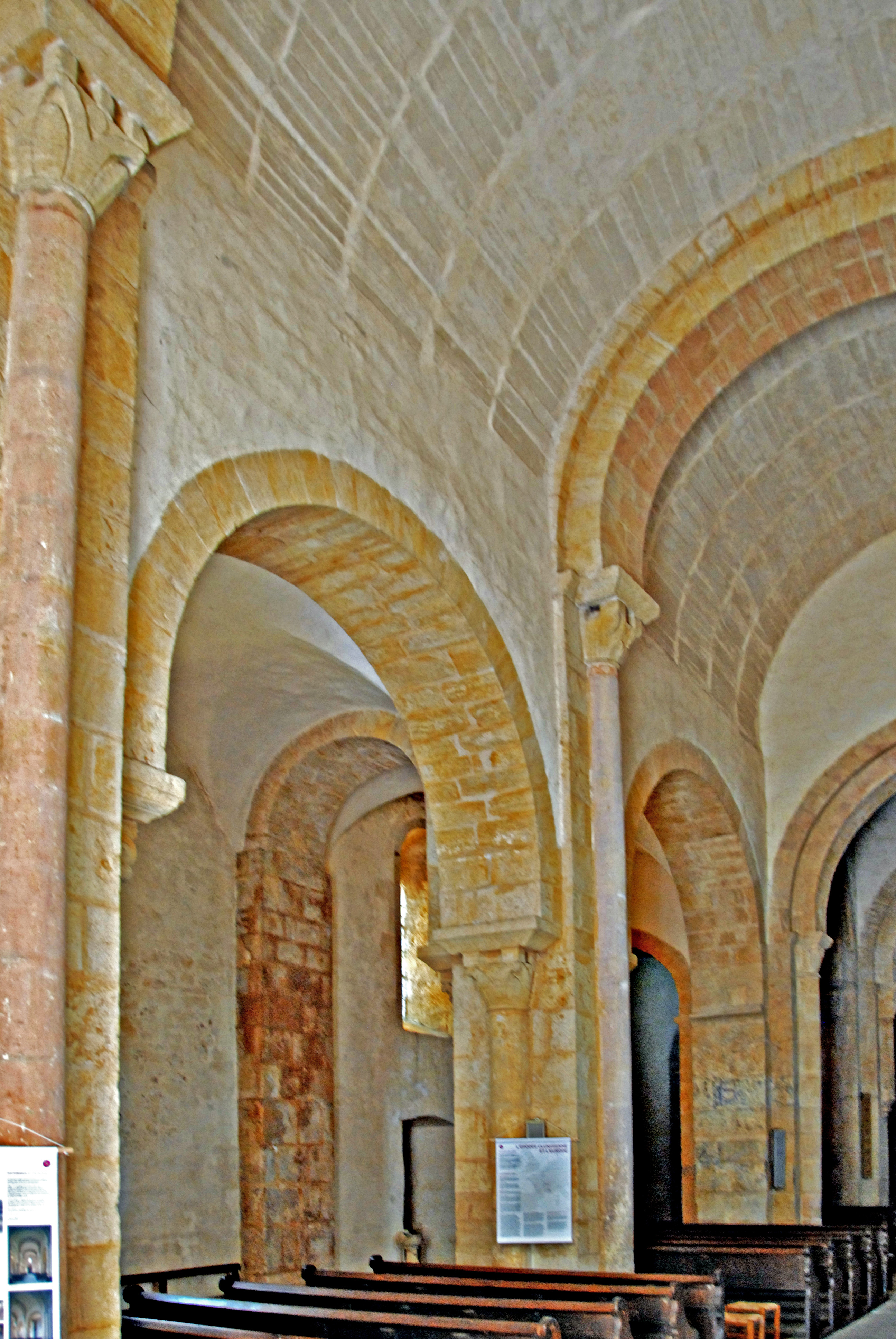 St-André d'Iguerande, Mittelschiff, Nordwest-Wand